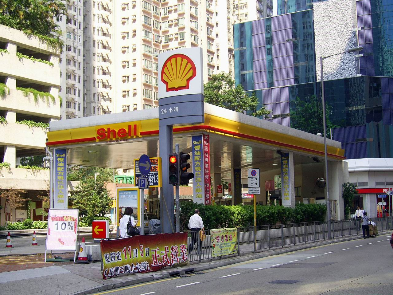 中文（香港）: 香港銅鑼灣電氣道的蜆殼油站